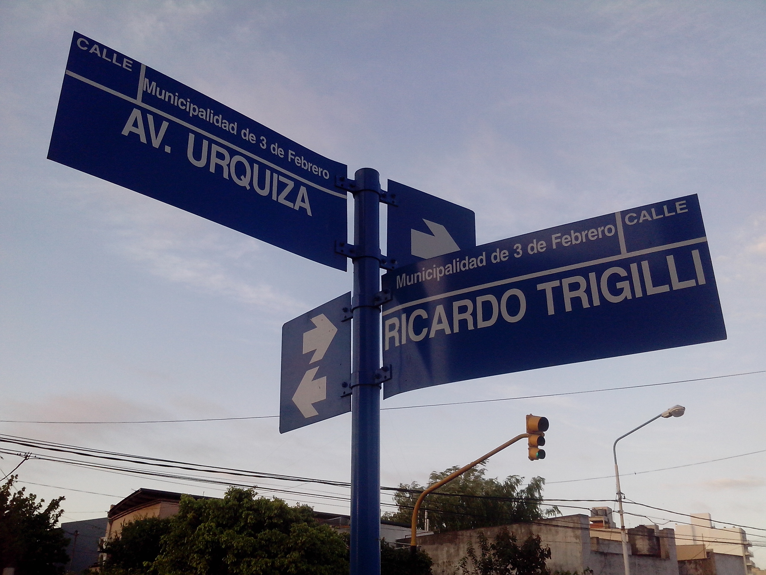 Cartel calle